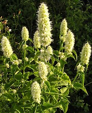 Agastache anethiodora = Agastache foeniculum espécie nativa da Ásia e é de igual maneira as demais da América do Norte.